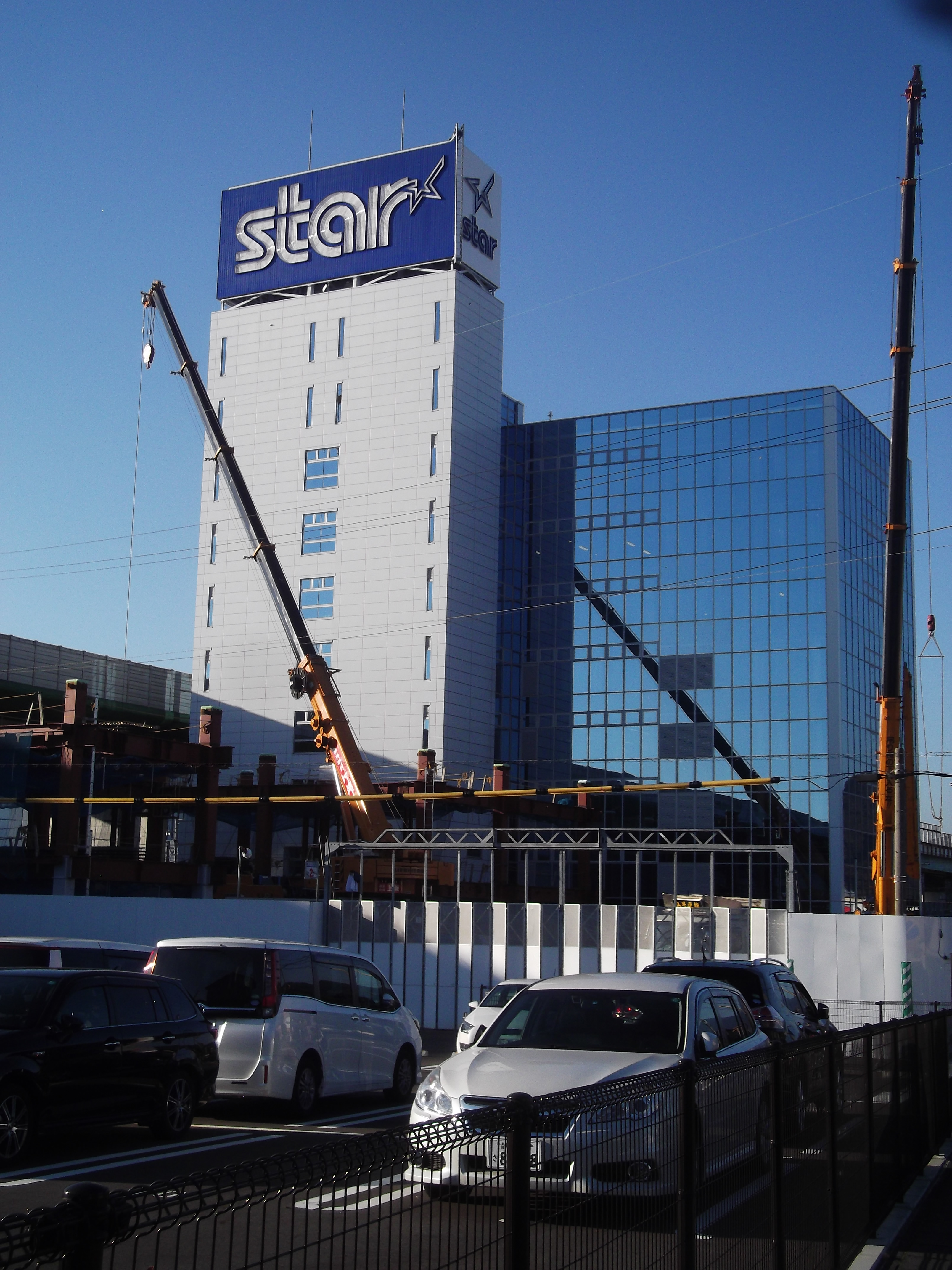 スター精密本社ビル。隣の高速道路は東名高速道路。